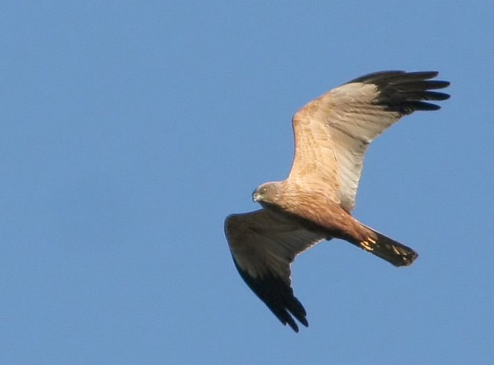 Circus aeruginosus, male, in Lasy Janowskie, Poland